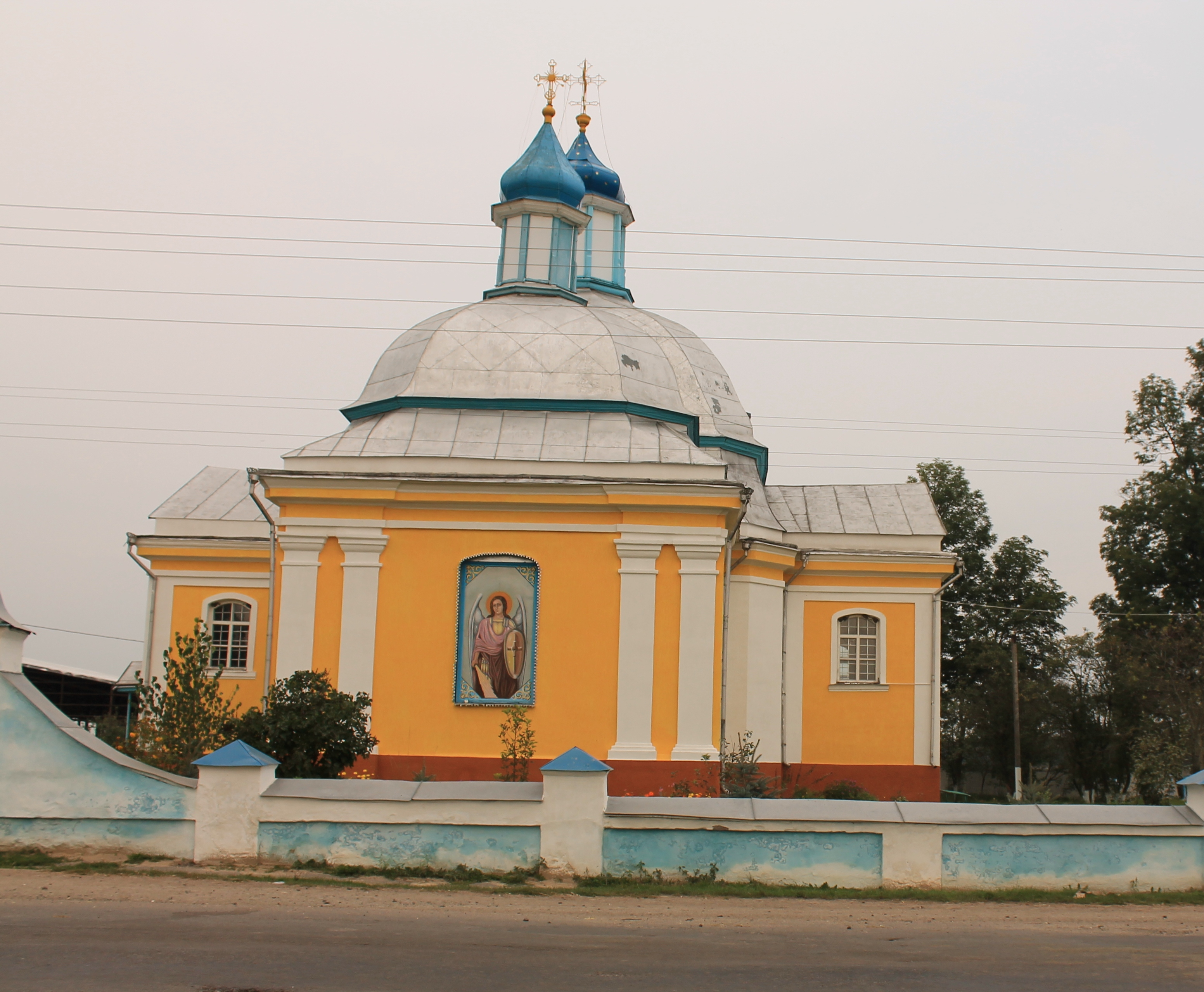 Михайлівська церква (мур.), село Аннопіль